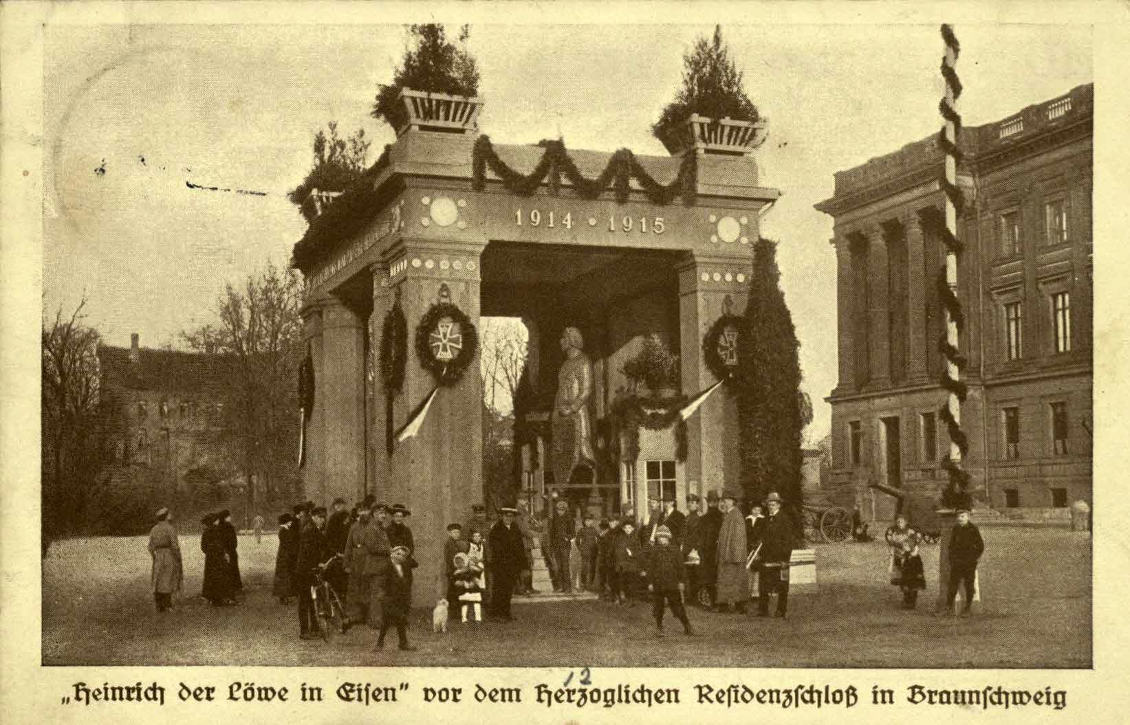 Braunschweig, Erster Weltkrieg: Der „ Eiserne Heinrich“ vor dem Braunschweiger Schloss. Postkarte um 1915.